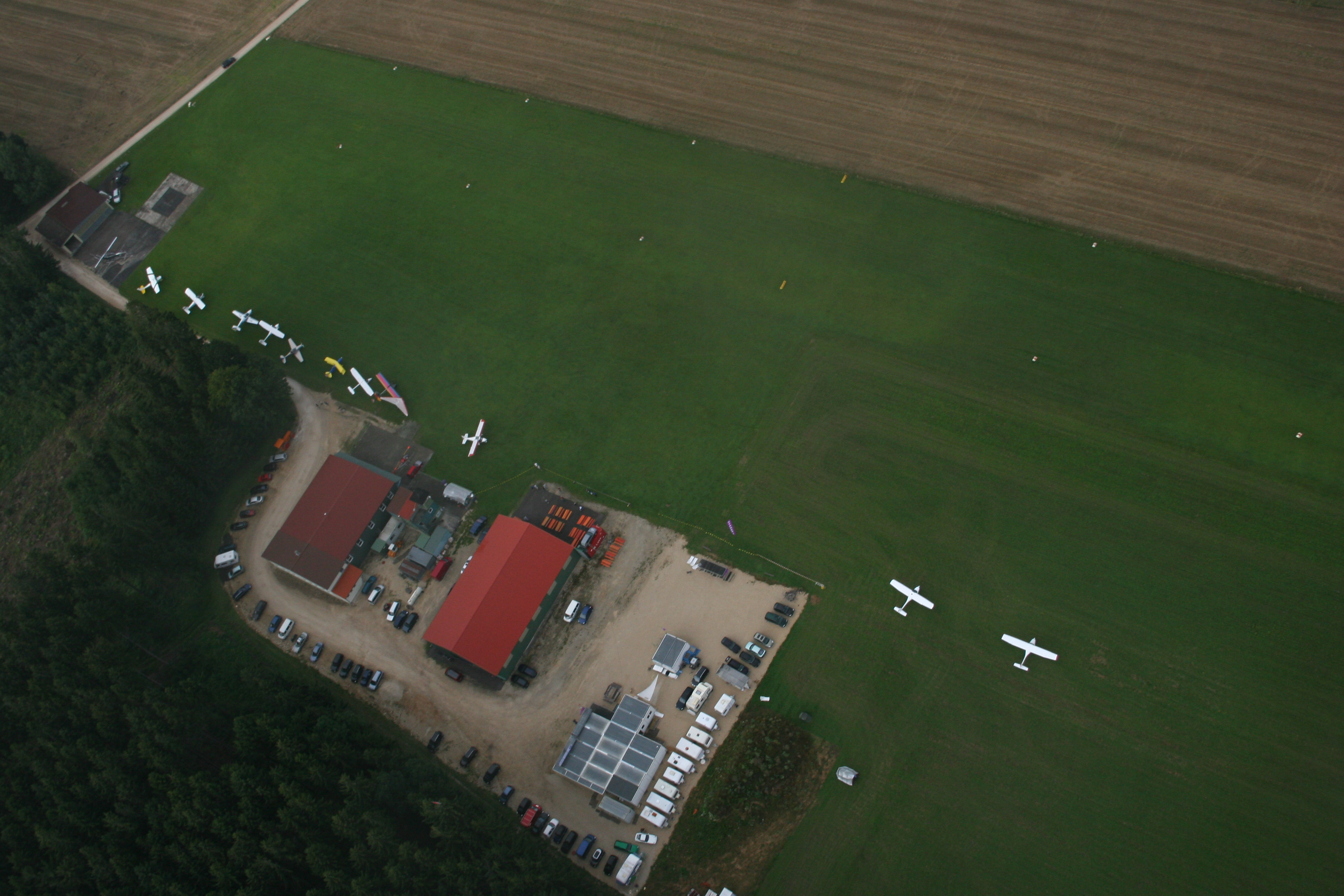 Flugplatz Thalmässing EDPW